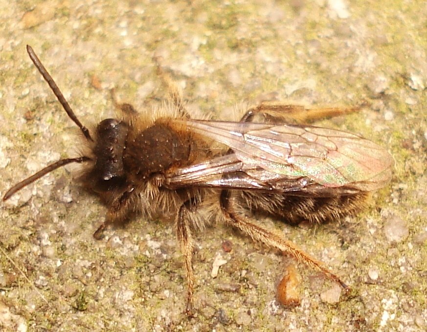 Probably Andrena clarkella male.